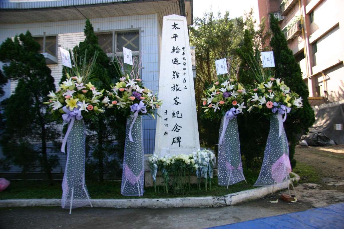 太平輪遇難旅客紀念碑，1951年（中華民國40年）立，于右任題字，位於基隆市中正區東海街海軍基隆後勤支援指揮部圍牆內。